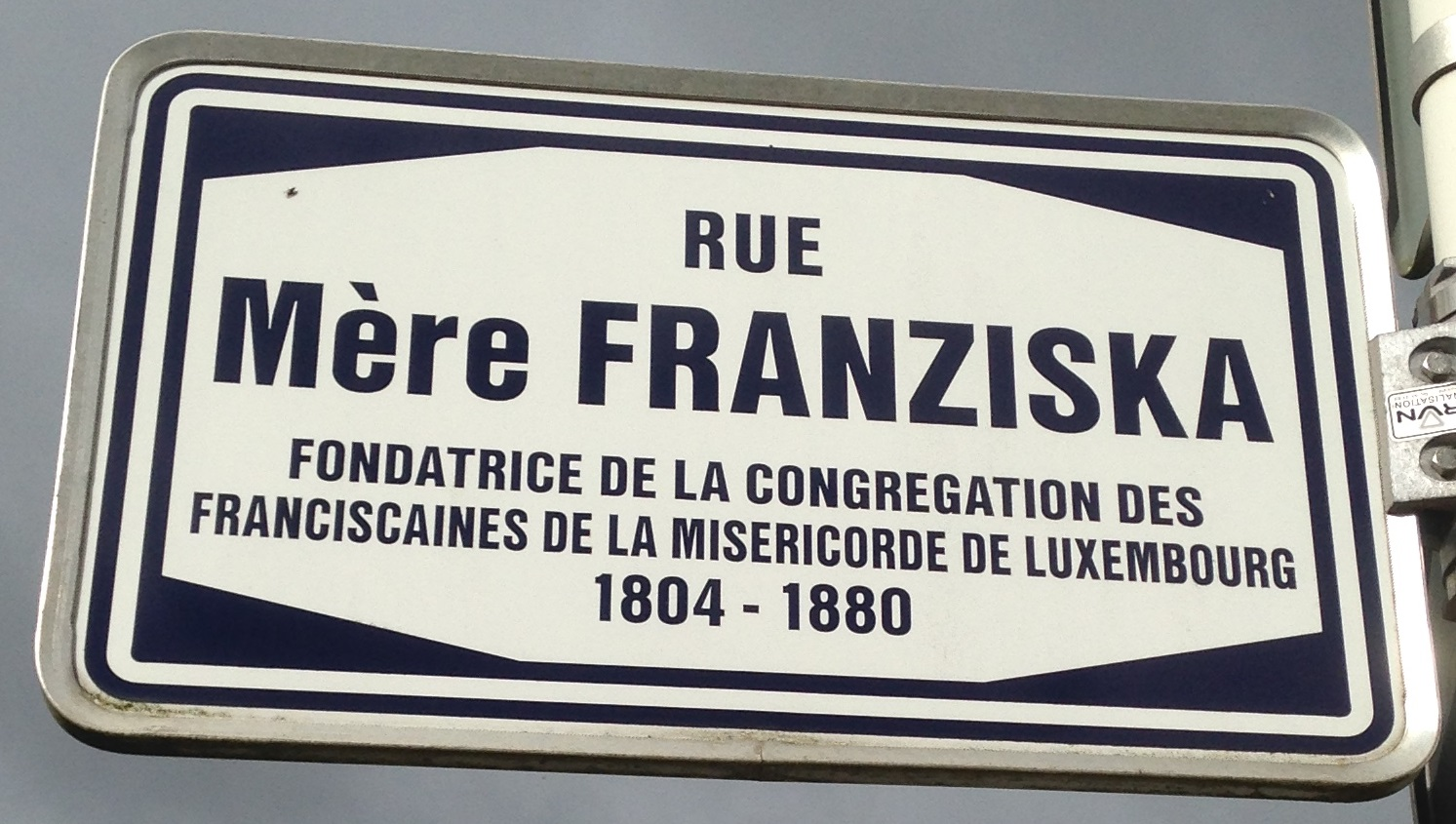 Stroosseschëld vun der Rue Mère Franziska um Belair an der Stad Lëtzebuerg.